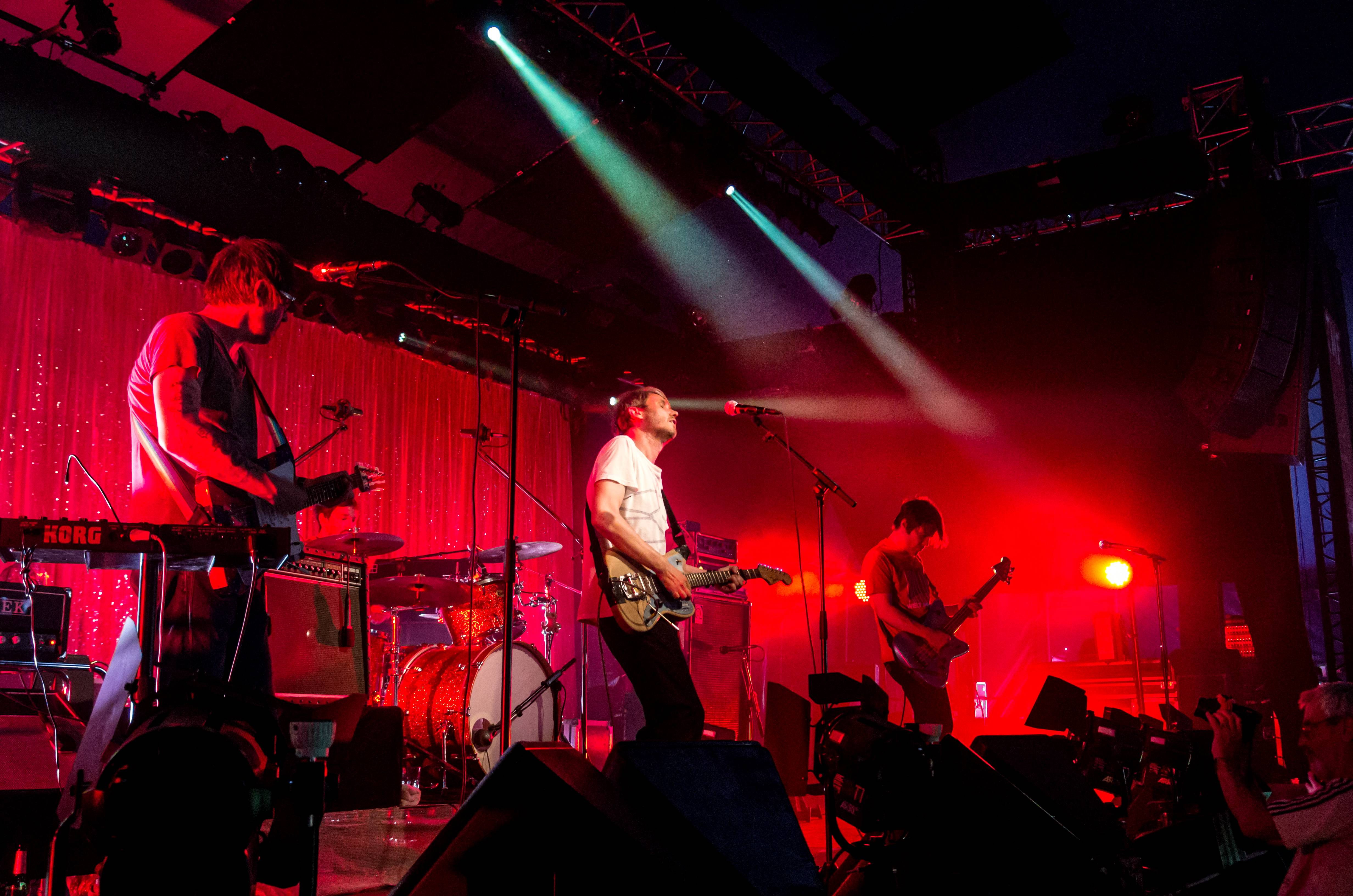 Bilder vom ZMF 2015 Die Rock Band Tocotronic